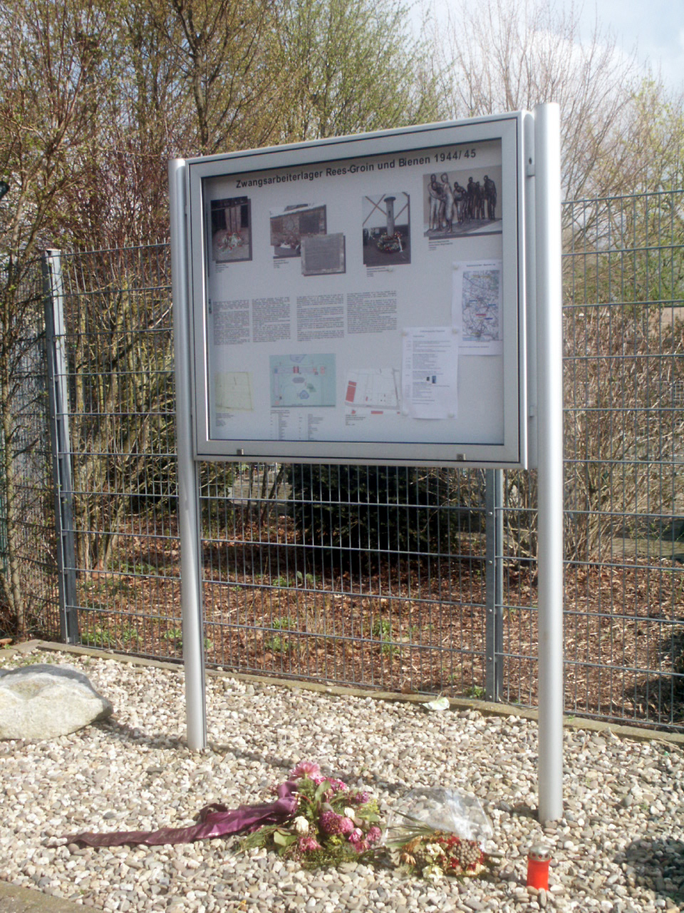 Rees: "Kamp Rees" / Zwangsarbeitslager Groin und Bienen 1944-45 Melatenweg, Rees, Deutschland